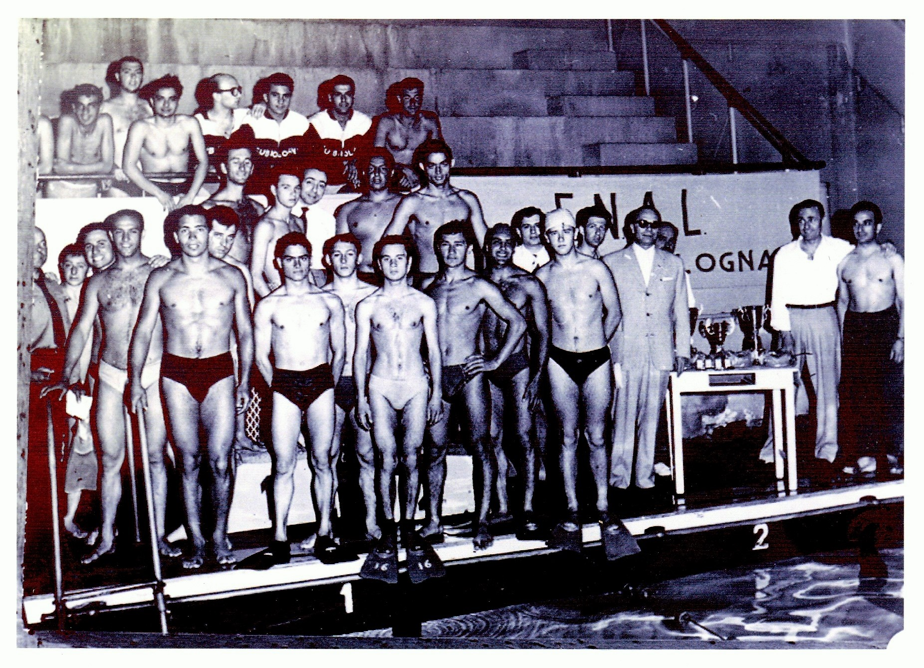 I partecipanti della prima competizione al mondo di nuoto pinnato in vasca, quadrangolare organizzato da Franco Pavone, presidente e fondatore della Sub Bologna, tra società di Bologna, Genova, Milano e Torino. Bologna, 1959, piscina comunale coperta.